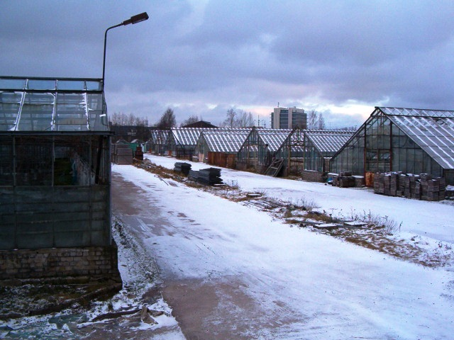 Laki I kvartali (Kadaka asum) endine Kadaka aiandi territoorium. Tallinn